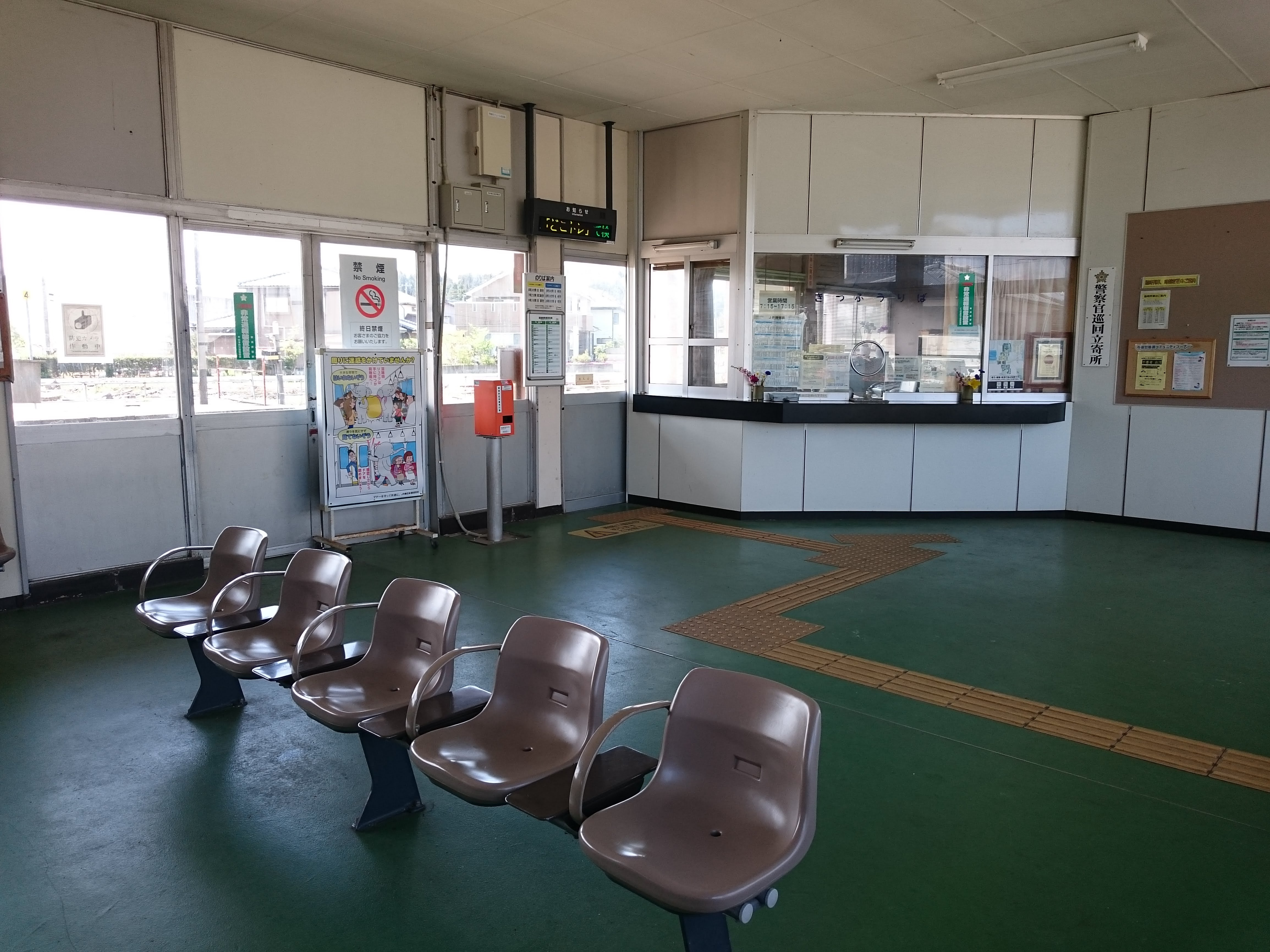 寺泊駅のコンコース